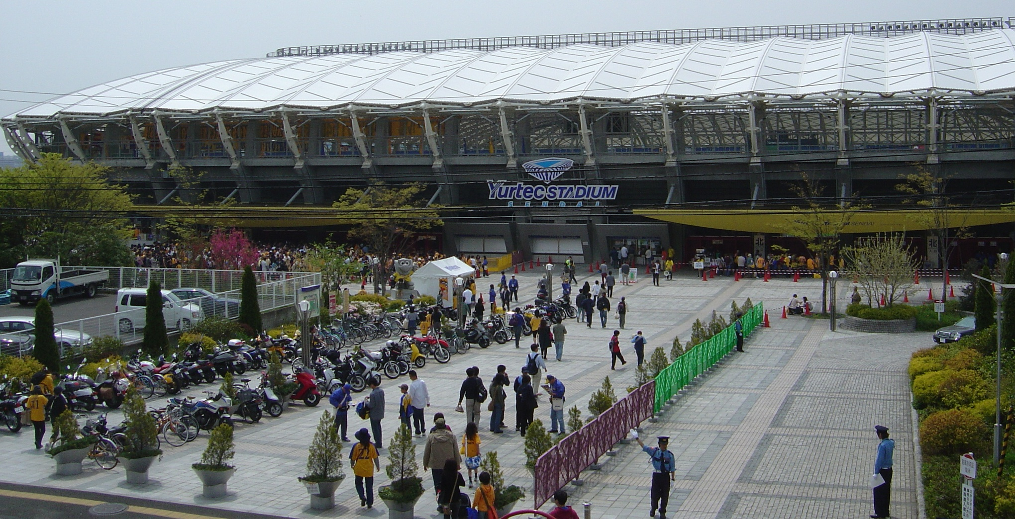 Sendai Stadium, in Sendai, Japan